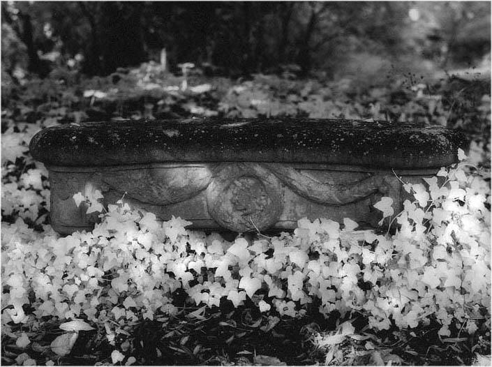 Steincanapé im Schlosspark Schwanberg (bei Rödelsee, Mainfranken)